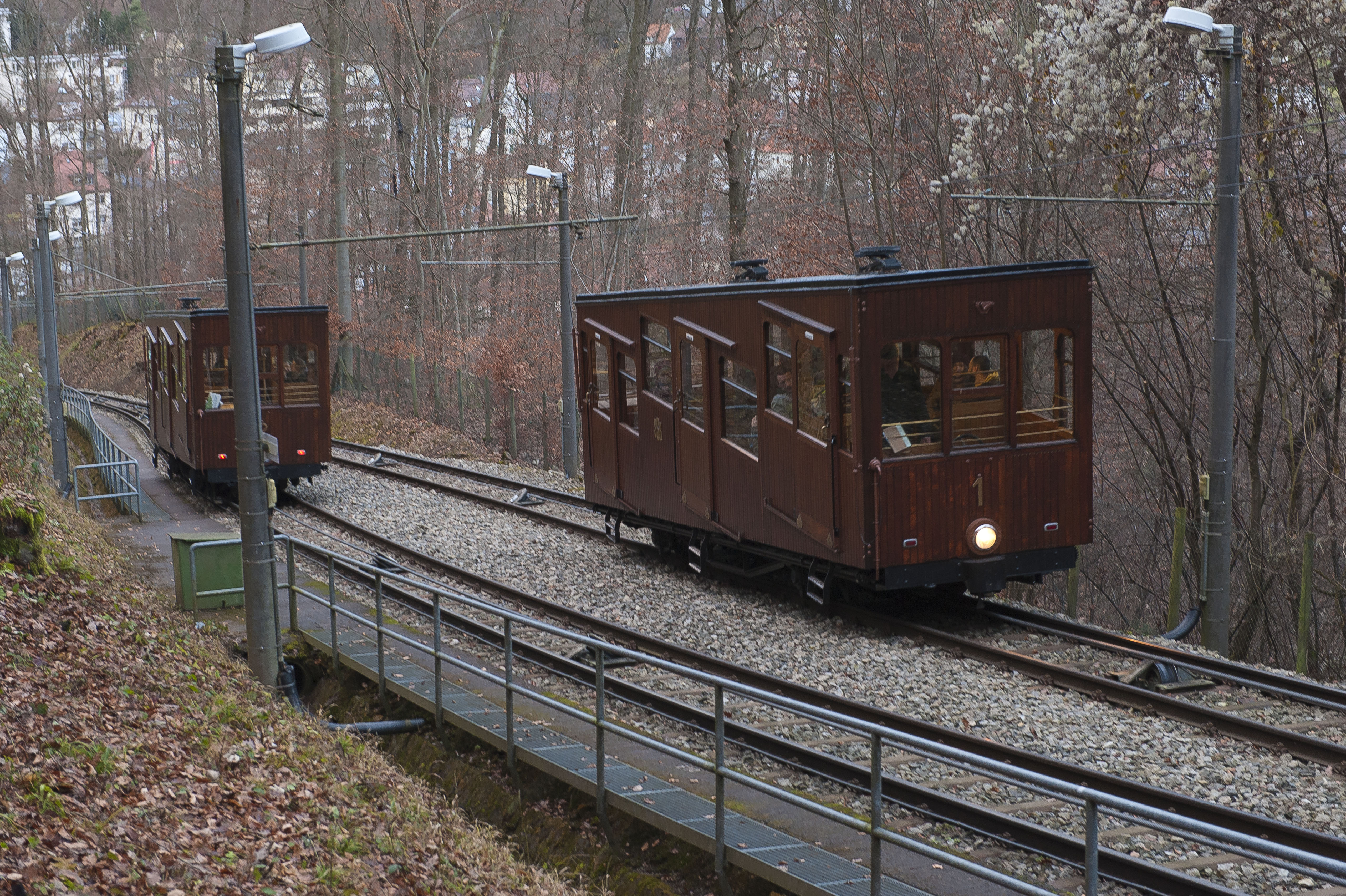 Standseilbahn Stuttgart. Ausweichstelle in der Mitte der Strecke